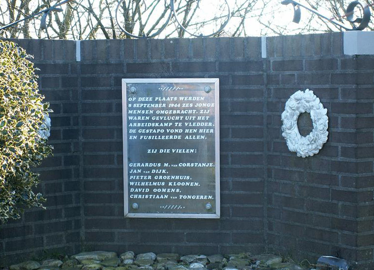 Monument Kamp Vledder